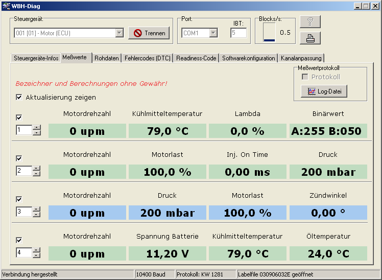 WBH-Diag Screenshot Version 0.8x Ich bin Autor der Software und gebe den Screenshot frei. This screenshot either does not contain copyright-eligible parts or visuals of copyrighted software, or the author has released it under a free license (which should be indicated beneath this notice), and as such follows the licensing guidelines for screenshots of Wikimedia Commons. You may use it freely according to its particular license. Free software license: see below Note: if the screenshot shows any work that is not a direct result of the program code itself, such as a text or graphics that are not part of the program, the license for that work must be indicated separately.